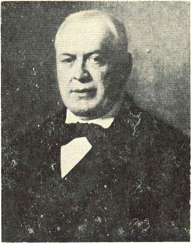 Schilderij van Pieter Ecrevisse - 1804-1879 - vrederechter - Eeklo - Oost-Vlaanderen - Vlaanderen - België